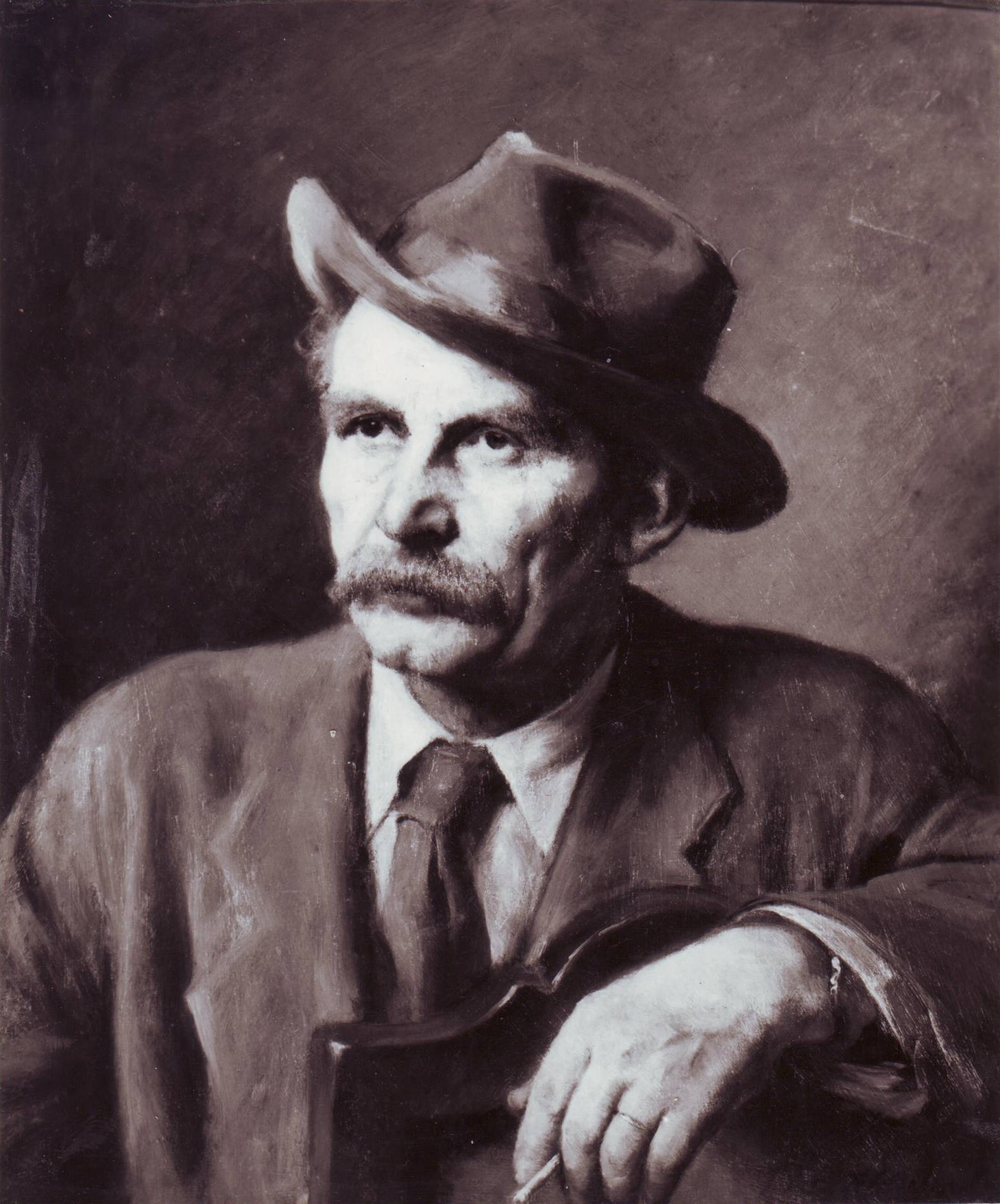 Ak.mal.Josef Brož - portrét od ak.mal.Františka Antonína Jelínka